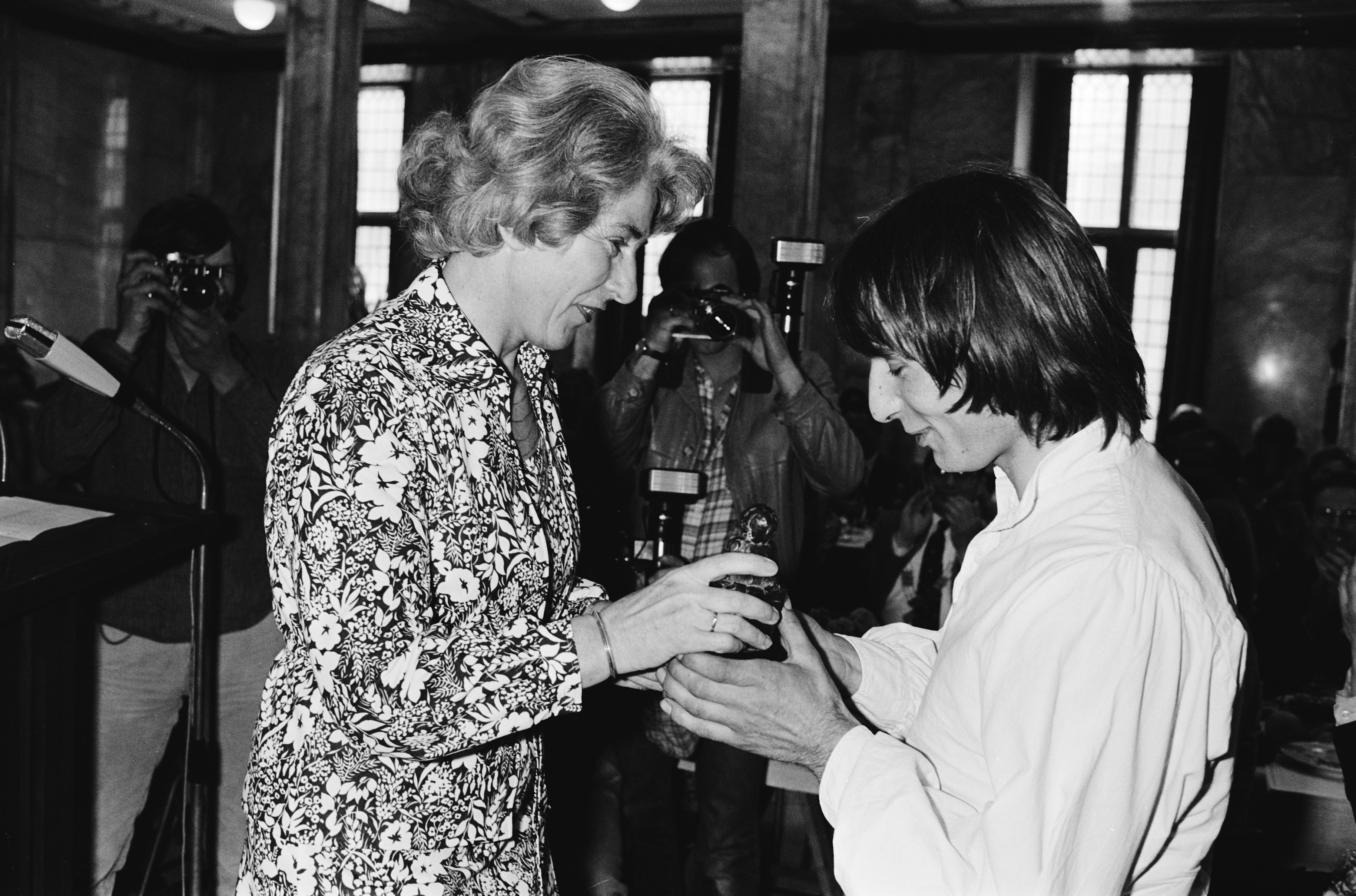 Collectie / Archief : Fotocollectie Anefo Reportage / Serie : [ onbekend ] Beschrijving : Toneelprijzen 1980 uitgereikt door minister Gardeniers (CRM) in Leiden; nr. 21 : Jozef v.d. Berg , kop Datum : 20 mei 1980 Locatie : Leiden, Zuid-Holland Trefwoorden : ministers, toneel Fotograaf : Suyk, Koen / Anefo Auteursrechthebbende : Nationaal Archief Materiaalsoort : Negatief (zwart/wit) Nummer archiefinventaris : bekijk toegang 2.24.01.05 Bestanddeelnummer : 930-8362